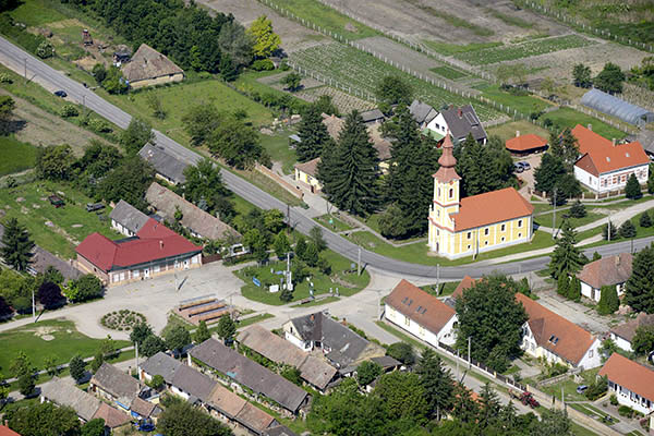 Légi fotó